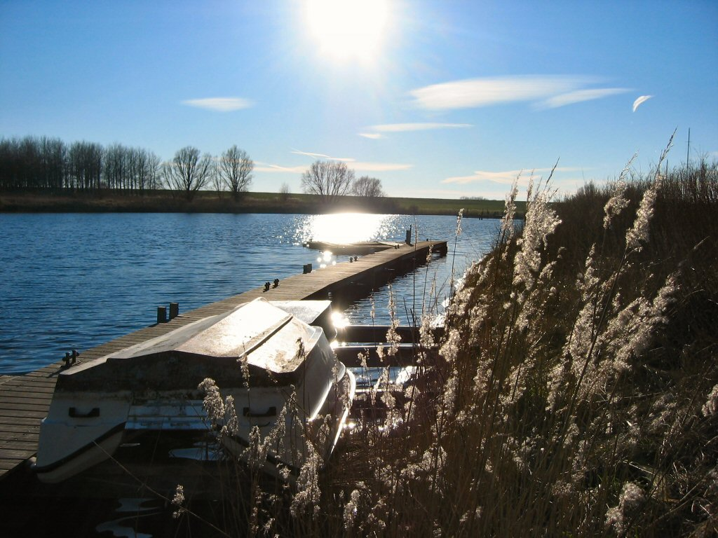 Nordseebad Hooksiel, Winterruhe am Hooksmeer